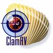 Proyecto ClamAV